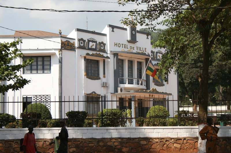 Rathaus (Hotel de Ville) von Bangui city, Zentralafrikanische Republick.